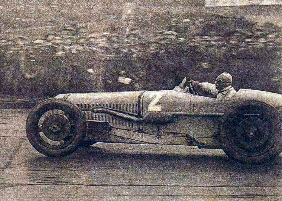 Robert Benoist vainqueur du Grand Prix de Grande-Bretagnee en octobre 1927 sur Delage.